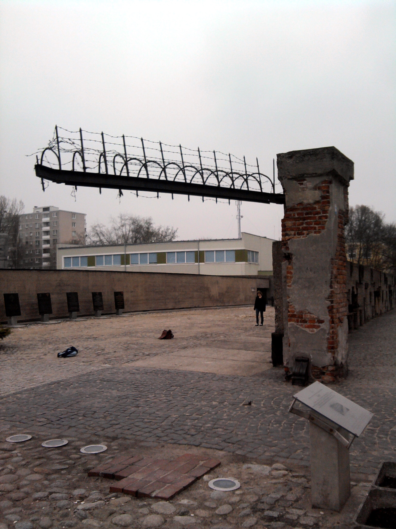 Filar.